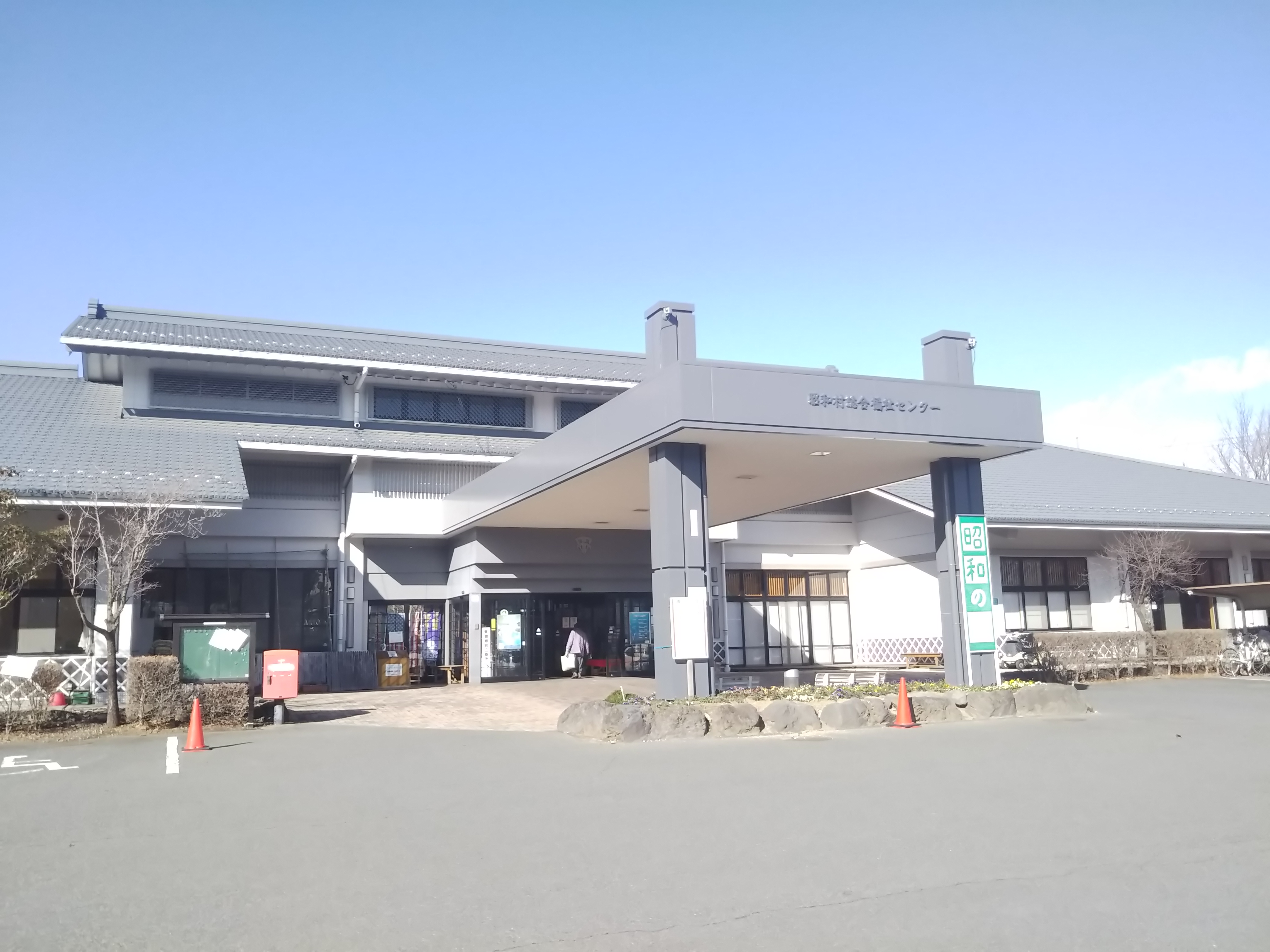 群馬県利根郡昭和村、昭和村総合福祉センター（天然温泉 昭和の湯）